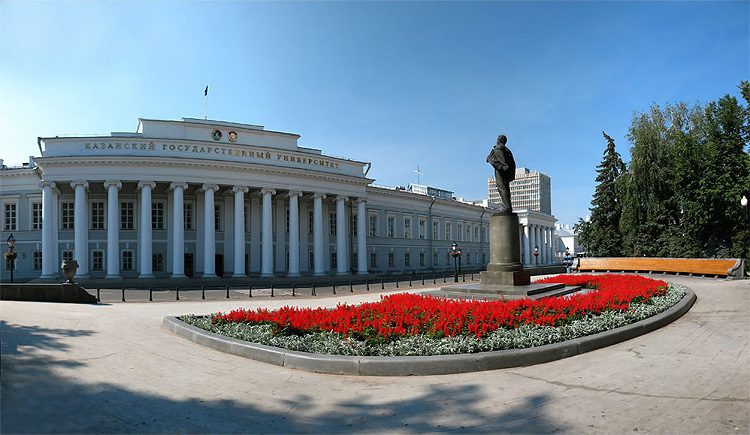 KSU, КГУ